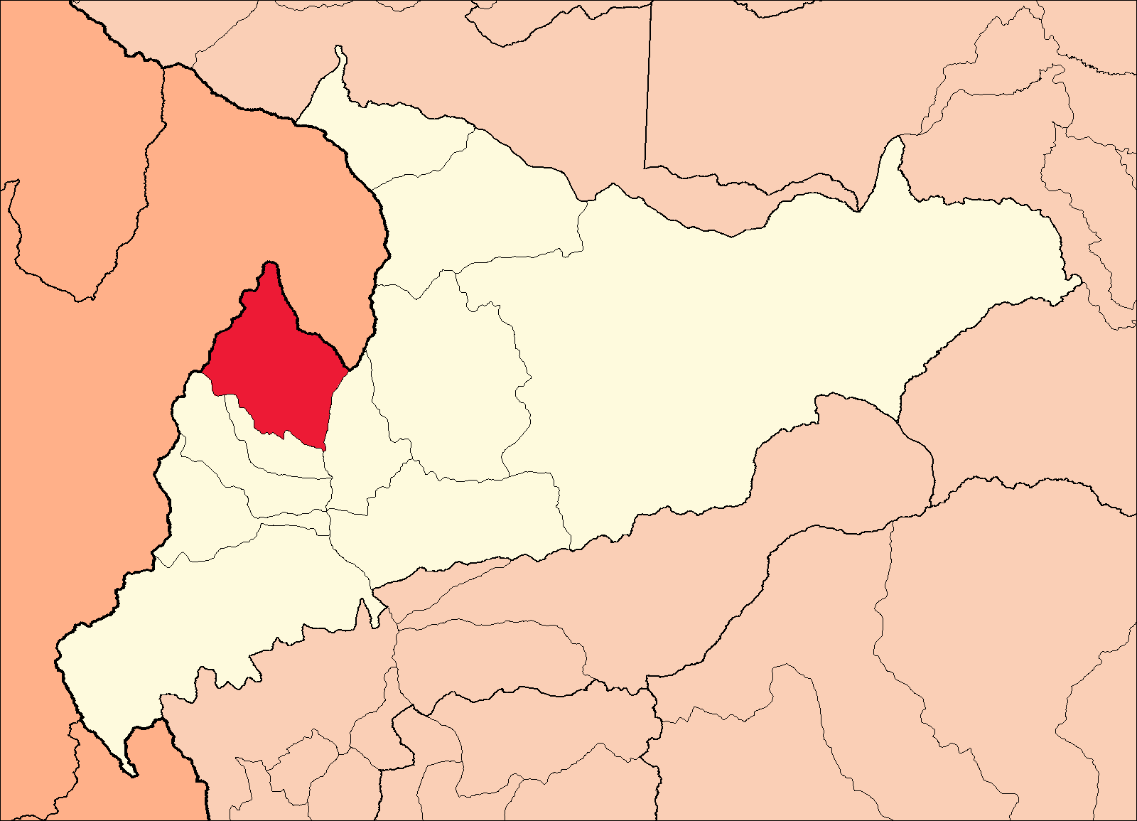 Área del distrito de Singa dentro de la provincia de Huamalíes.